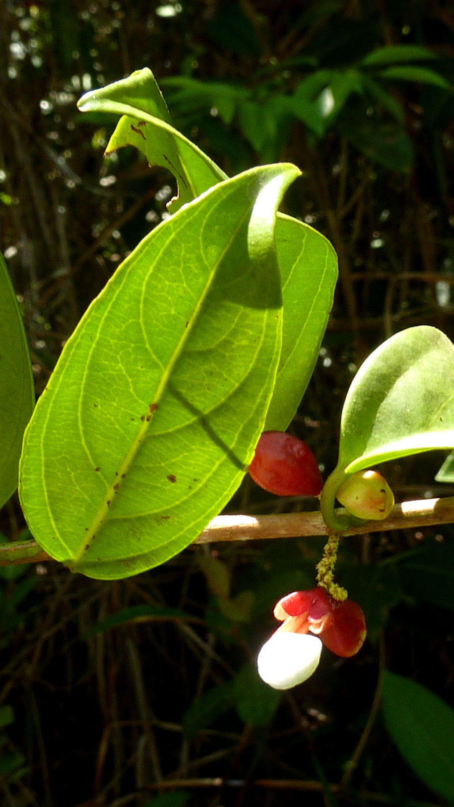 Lacistema hasslerianum Chodat